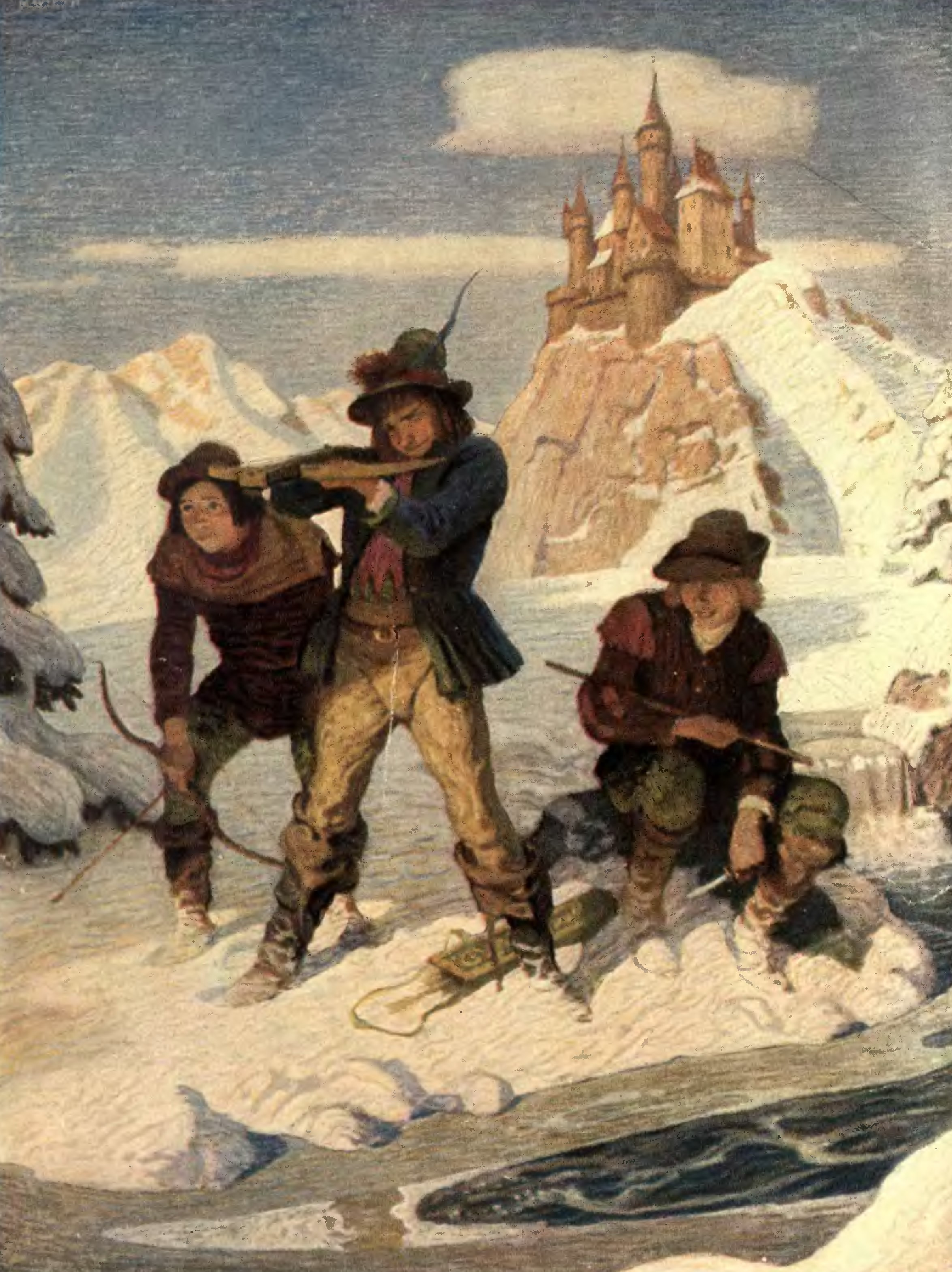 Ilustración de The Mysterious Stranger.